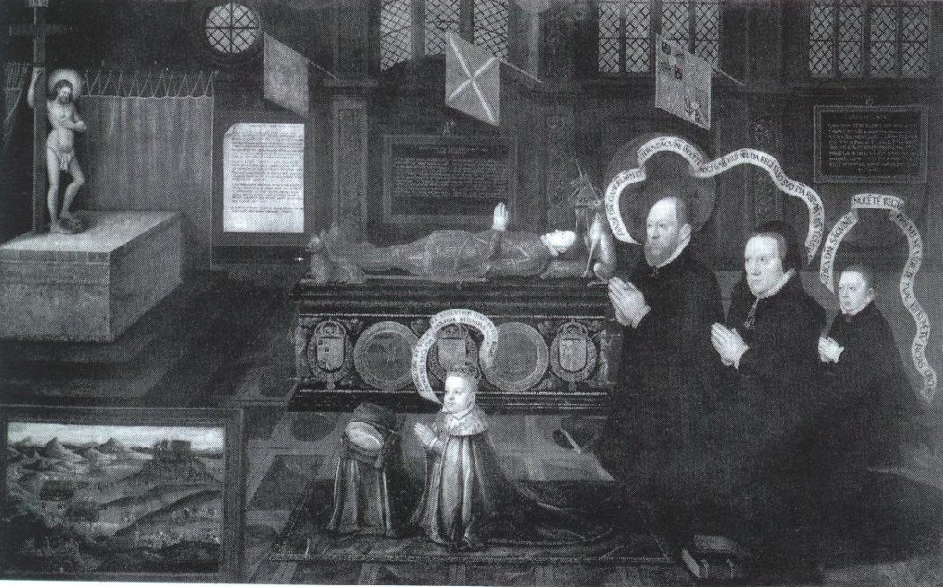 Familia Lenox, Matthew Stuart con la moglie Margaret Douglas, il figlio Charles e il nipote Giacomo VI di Scozia accanto alla salma del primogenito Henry Stuart, marito di Maria I di Scozia e padre di Giacomo